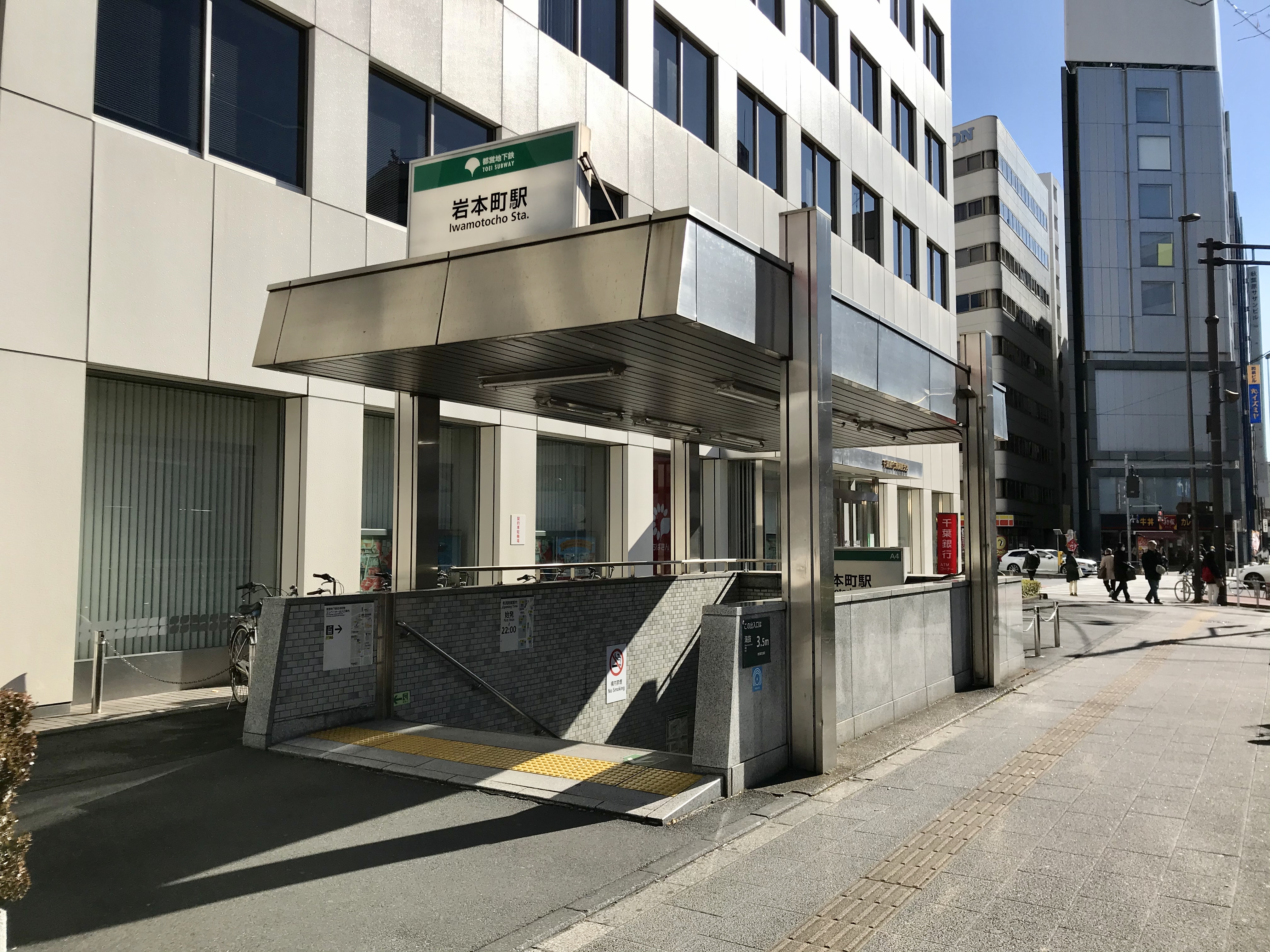 都営地下鉄新宿線岩本町駅A4番出入口